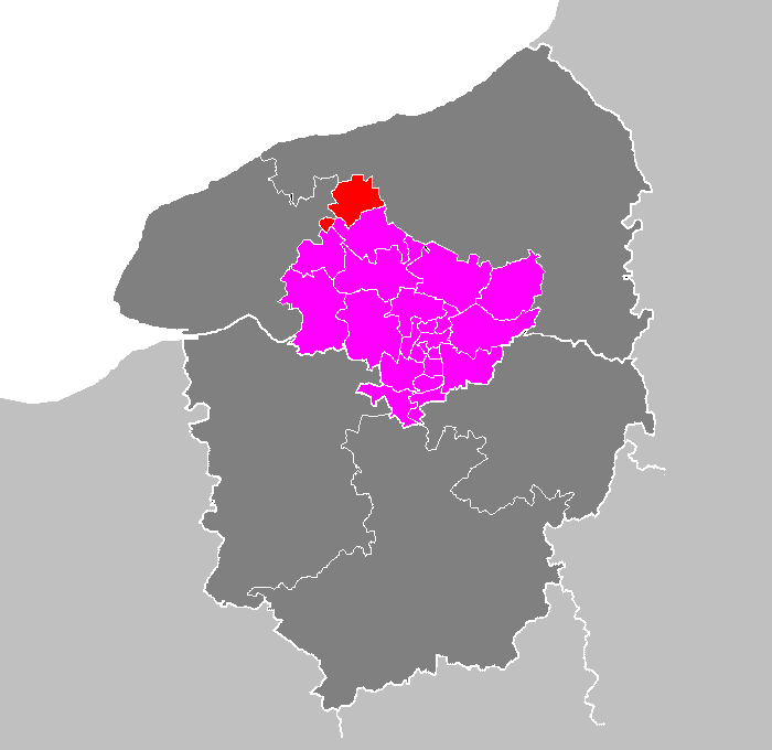 Maps of arrondissements and cantons of France: Arrondissement de Rouen - Canton de Doudeville.PNG